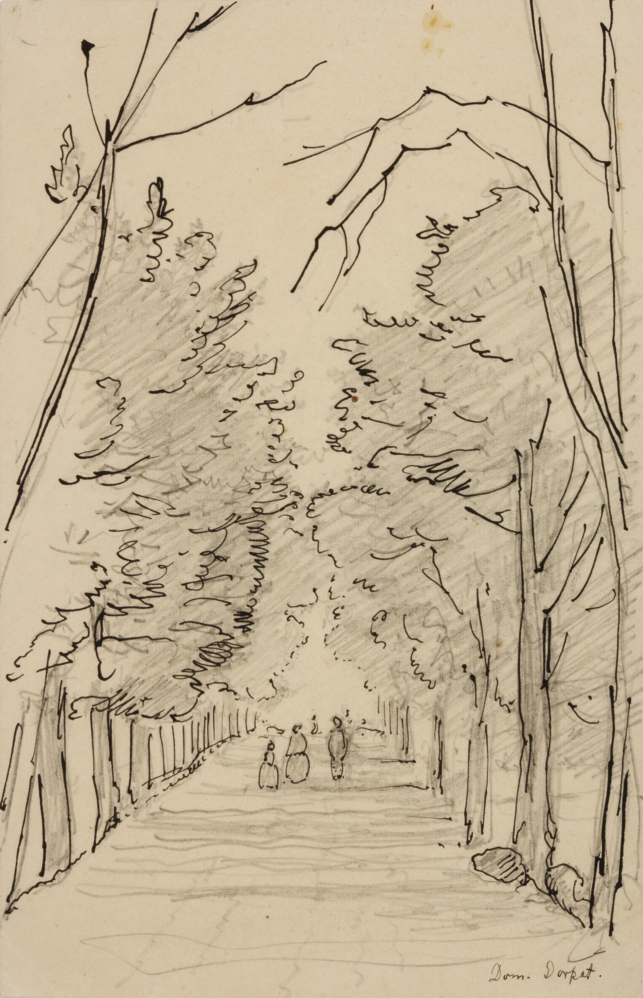 "Toome allee". Pliiats ja tušš paberil. 16,9 x 11,0 cm. MUIS:TKM TR 4405 B 1305 This image on crowdsourcing geotagging platform Ajapaik